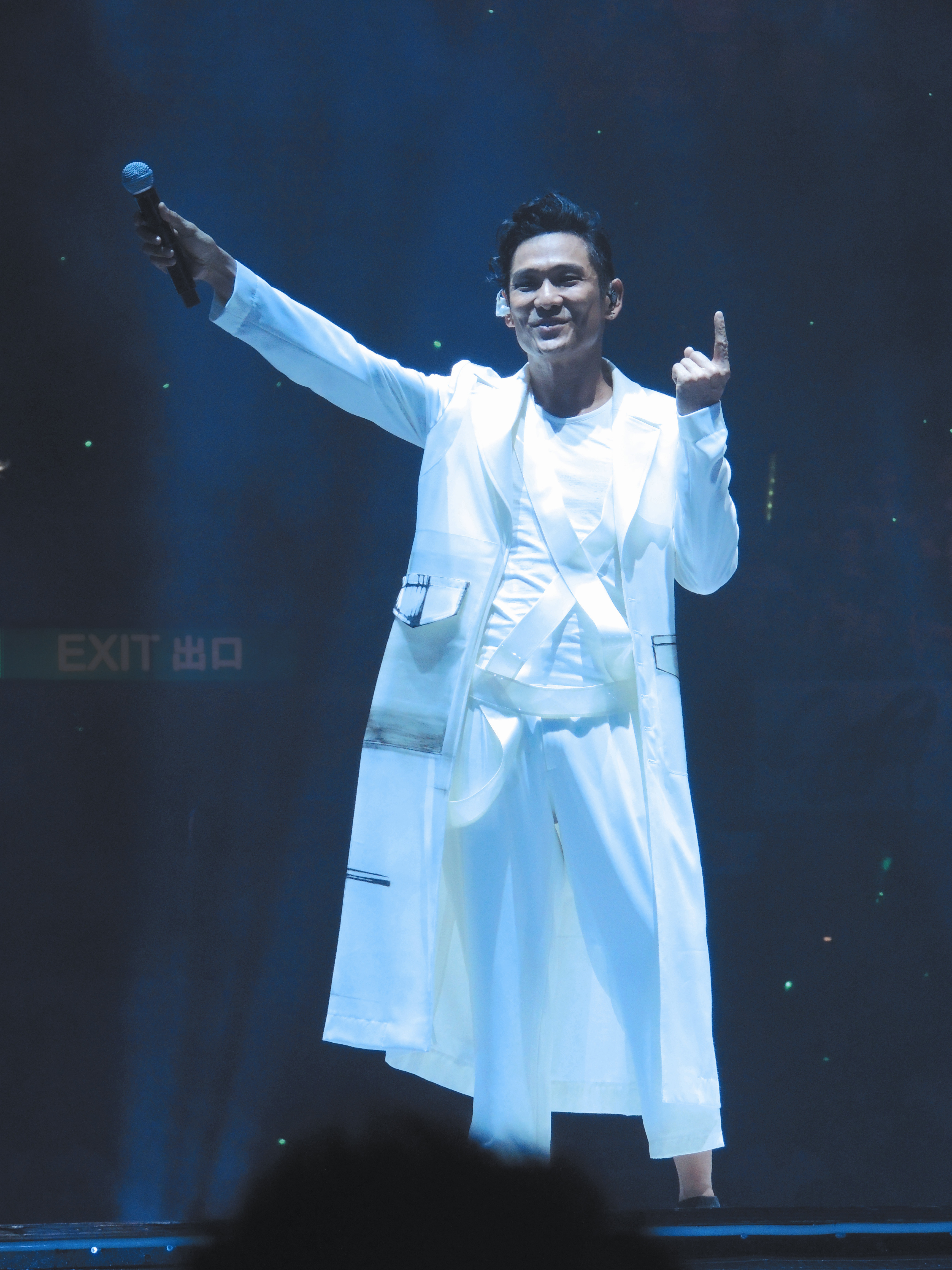 2014年參與極杜世界巡迴演唱會的杜德偉